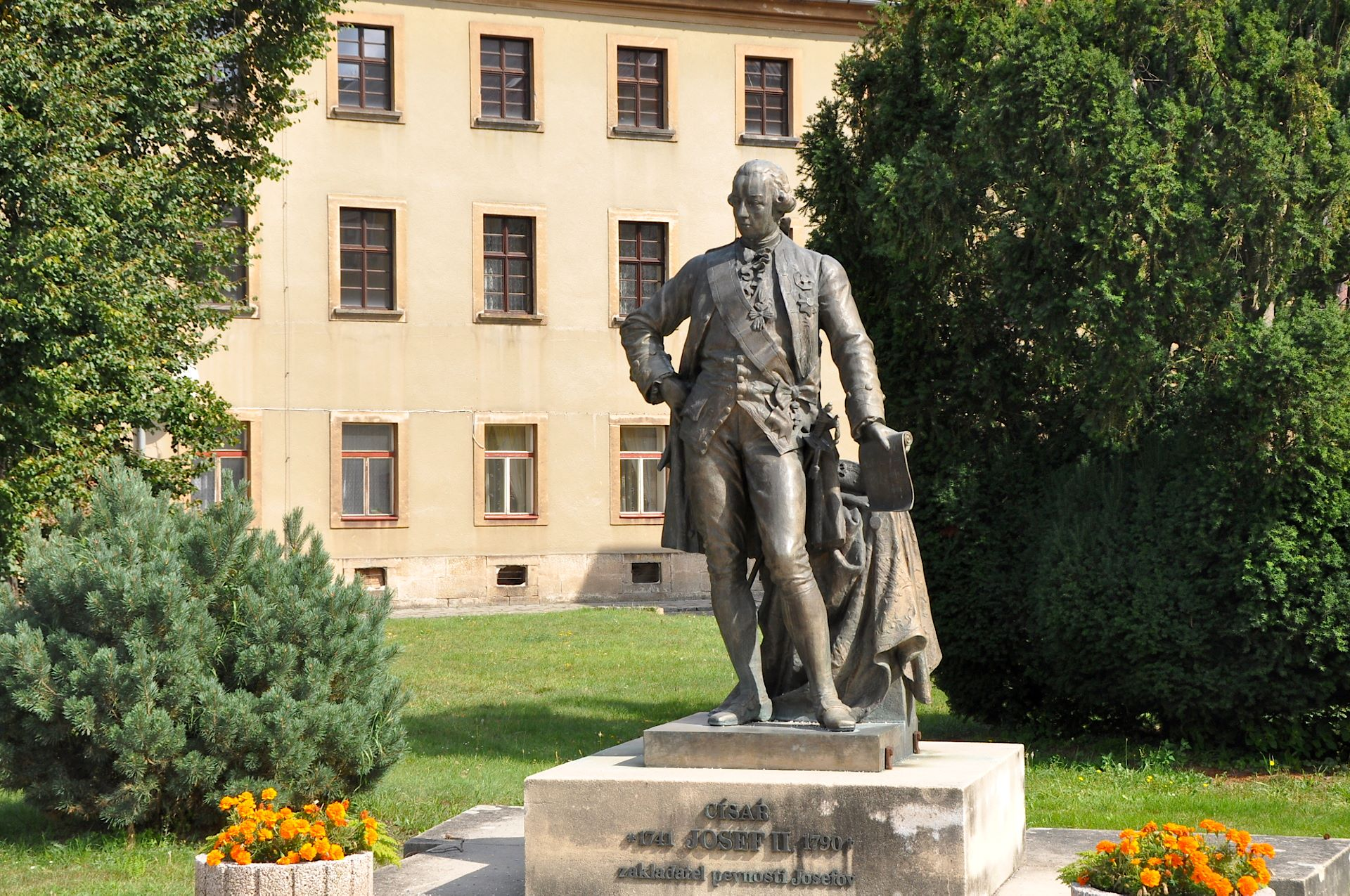 Festung Josefov